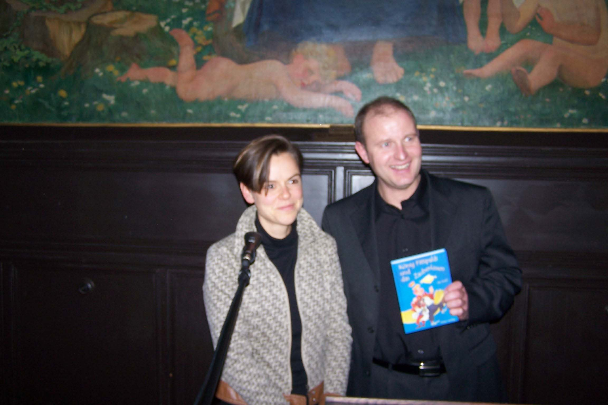 Antje Rávic Strubel (links) und Jan Kuhl, Preisträger 2005 des Marburger Literaturpreises, eigene Aufnahme (mit unvertrauter Digitalkamera) -- Temistokles 20:17, 29. Apr 2006 (CEST)